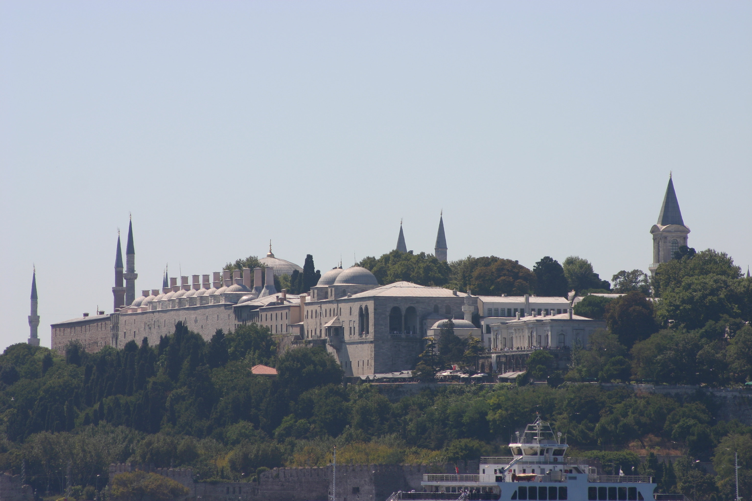 Palácio Topkapi visto do Bósforo